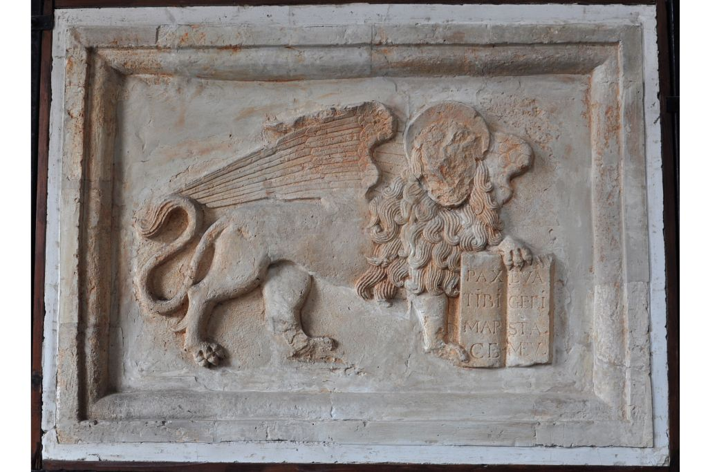 Leone nimbato con libro del vangelo di San Marco tra le zampe. Il manufatto originale è datato 1567-70. Località di provenienza: Chaniòporta, Iraklion, Creta. Attualmente il calco in gesso è conservato al Museo Storico Navale di Venezia.